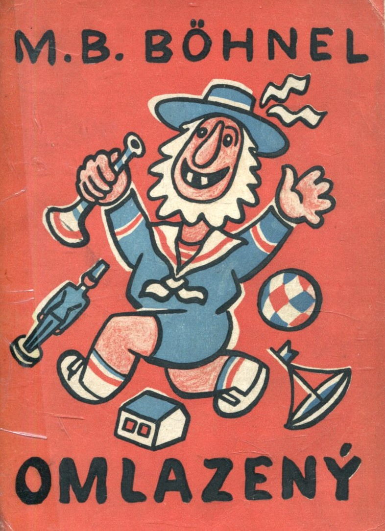 Josef Čapek, obálka knihy (M. B. Böhnel: Omlazený, 1926)